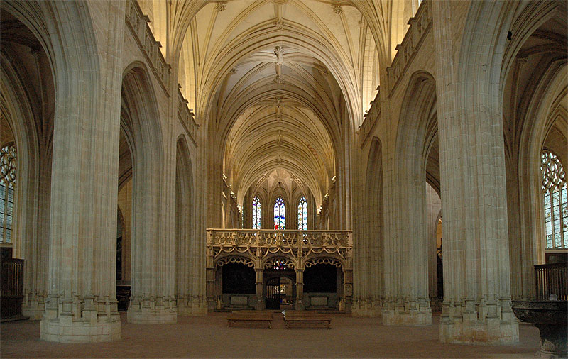 Monestir reial de Brou. Interior de l'església. Bourg-en-Bresse, França